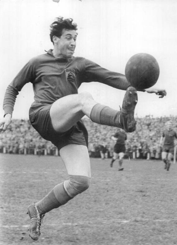 Zentralbild-Wlocka Bey-Krz. 20.4.1958 Lok Leipzig und Zwickau trennten sich 0:0 - In Leipzig standen sich am Sonntag, dem 20.4.1958, in einem Punktspiel der Fußball-Oberliga der SC Lokomotive Leipzig und Motor Zwickau gegenüber. Die Begegnung endete 0:0-Unentschieden. UBz. Der Leipziger Stürmer Krause in Aktion.